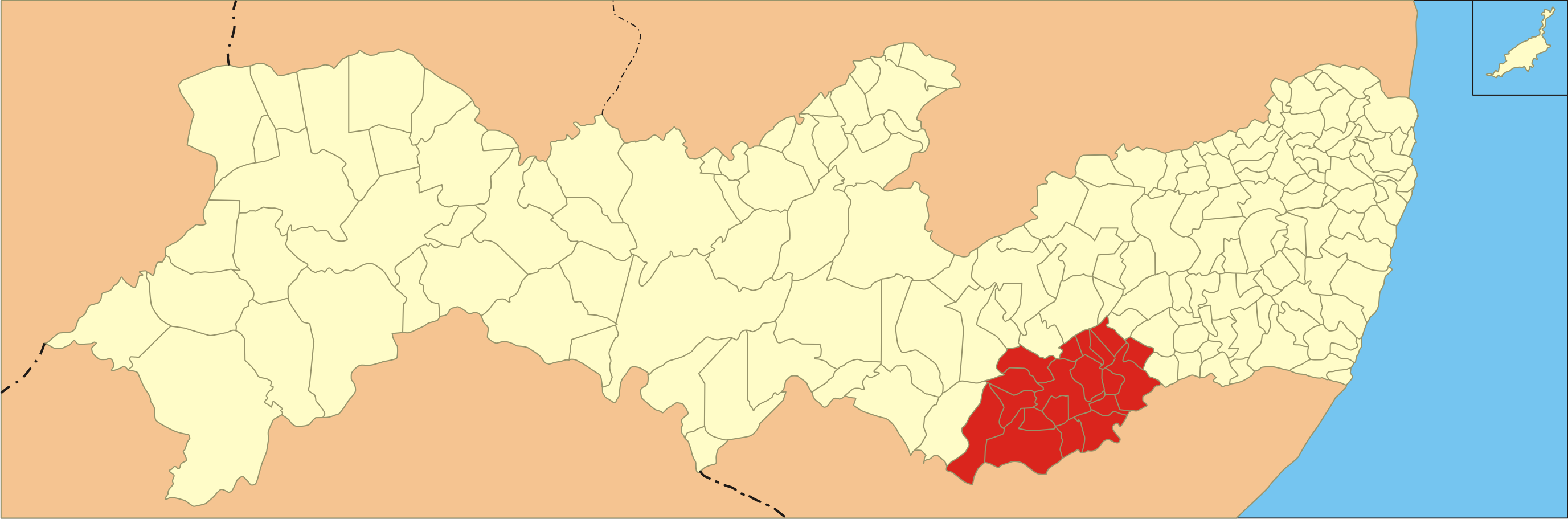 Localização da microrregião de Garanhuns em Pernambuco.